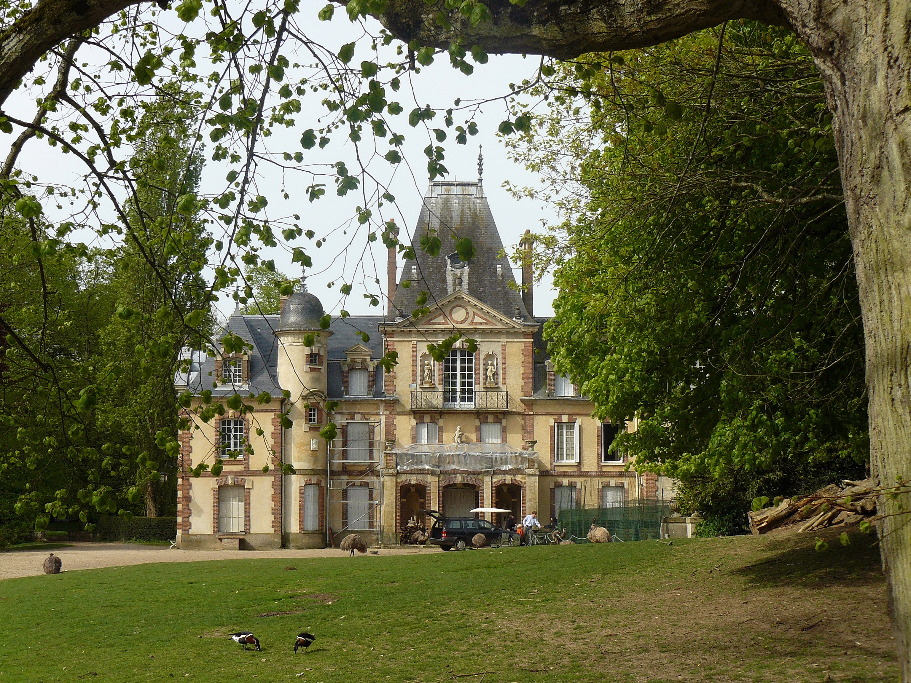 Château de Sauvage (Yvelines, France)